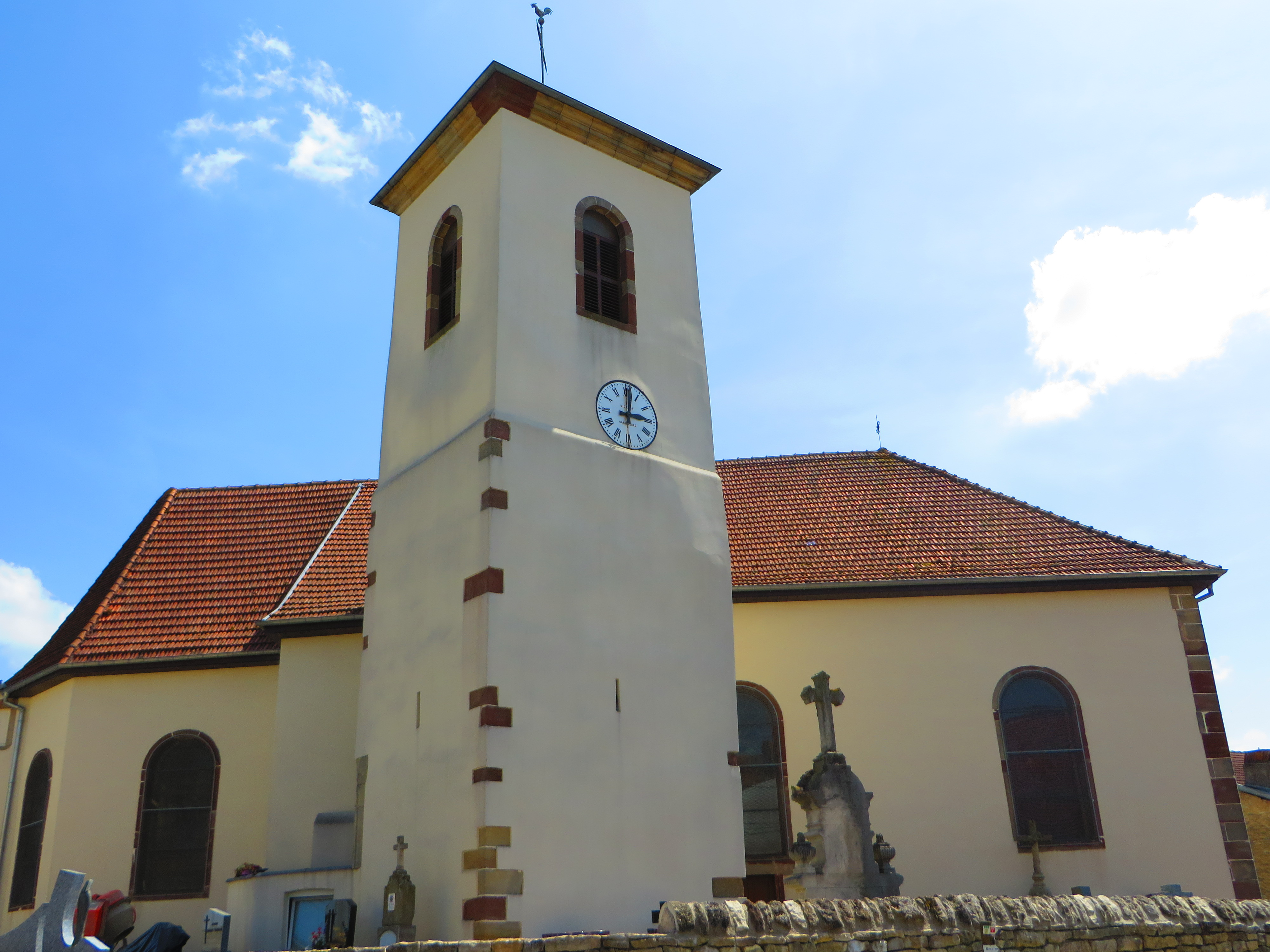 Landange eglise